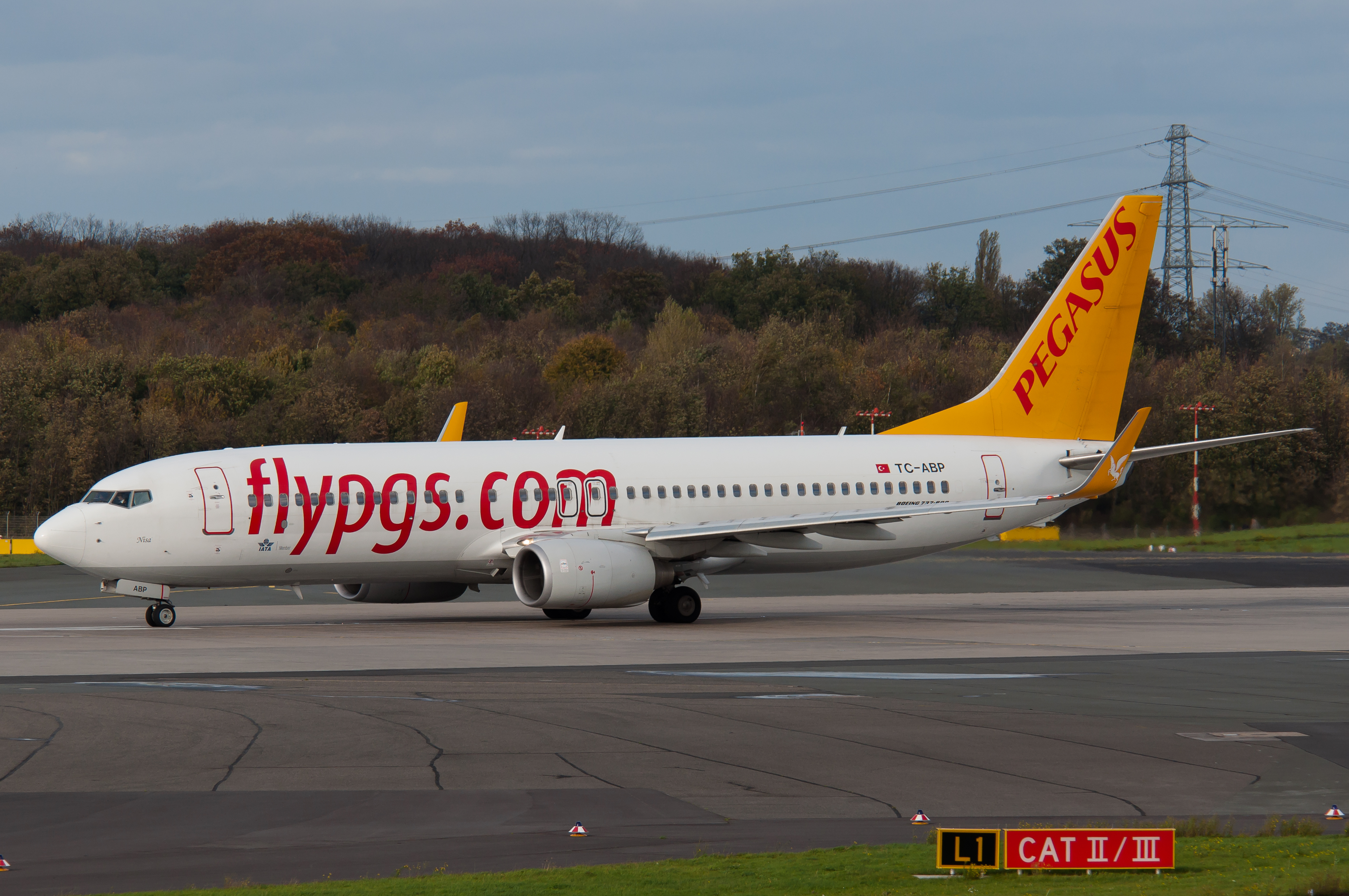 Dusseldorf, 3-11-2013